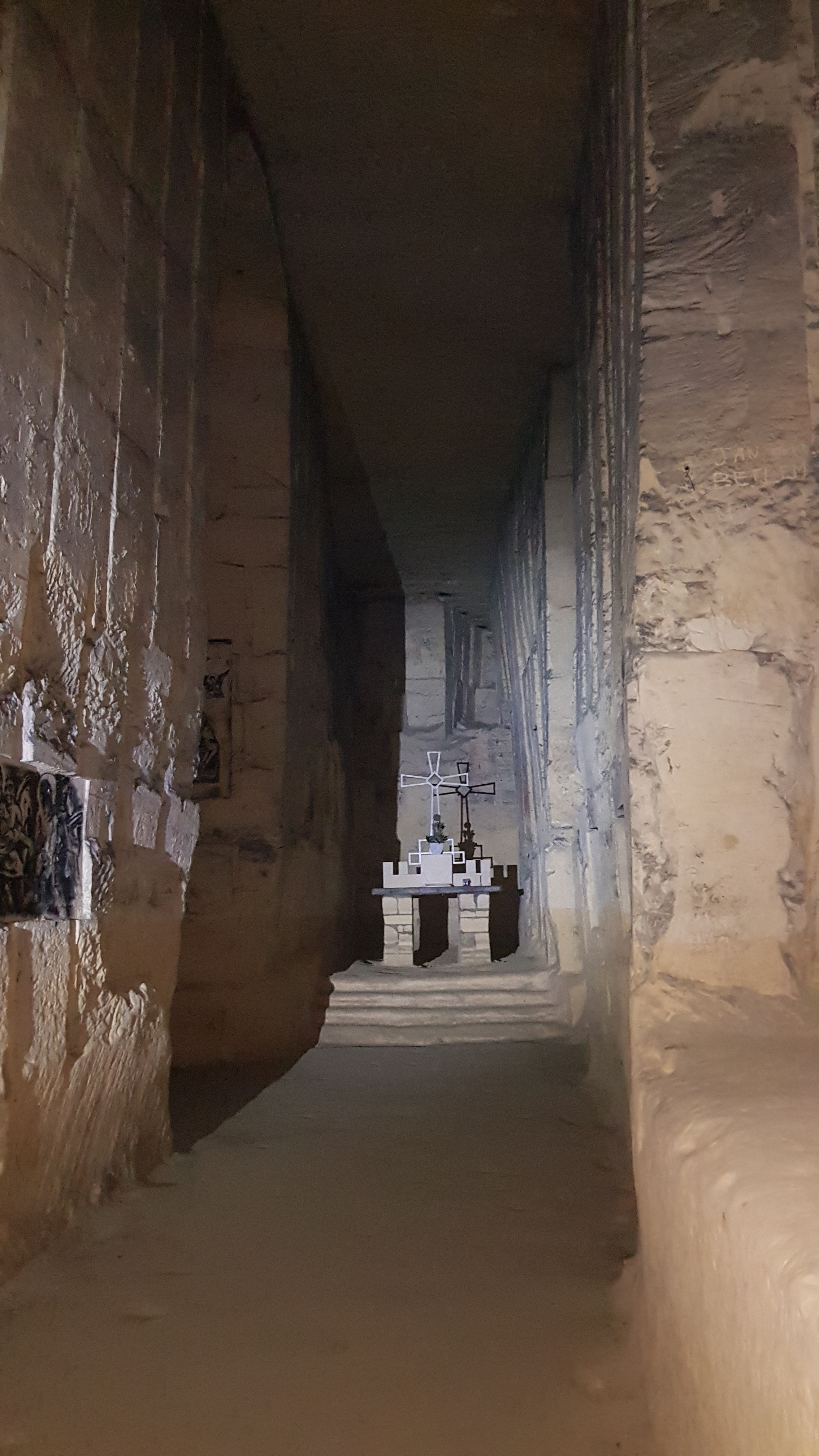 Gangenstelsel Zonneberg in de Sint-Pietersberg, Maastricht, Nederland